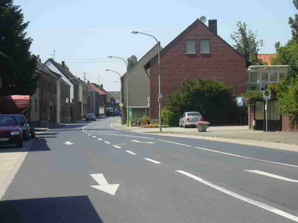 Pier Ortsdurchfahrt, ehemals B 56